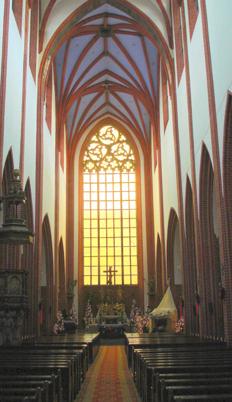 Wrocław, kościół p.w. św. Marii Magdaleny, ob. katedra polsko-kat., 1342-1360, 1 poł. XV, 1888-1992, po 1945